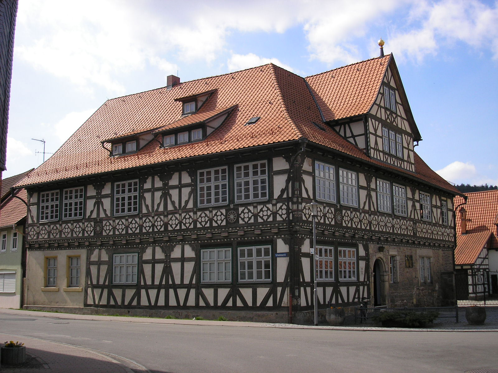 Ein Fachwerkhaus in Themar (Thüringen).